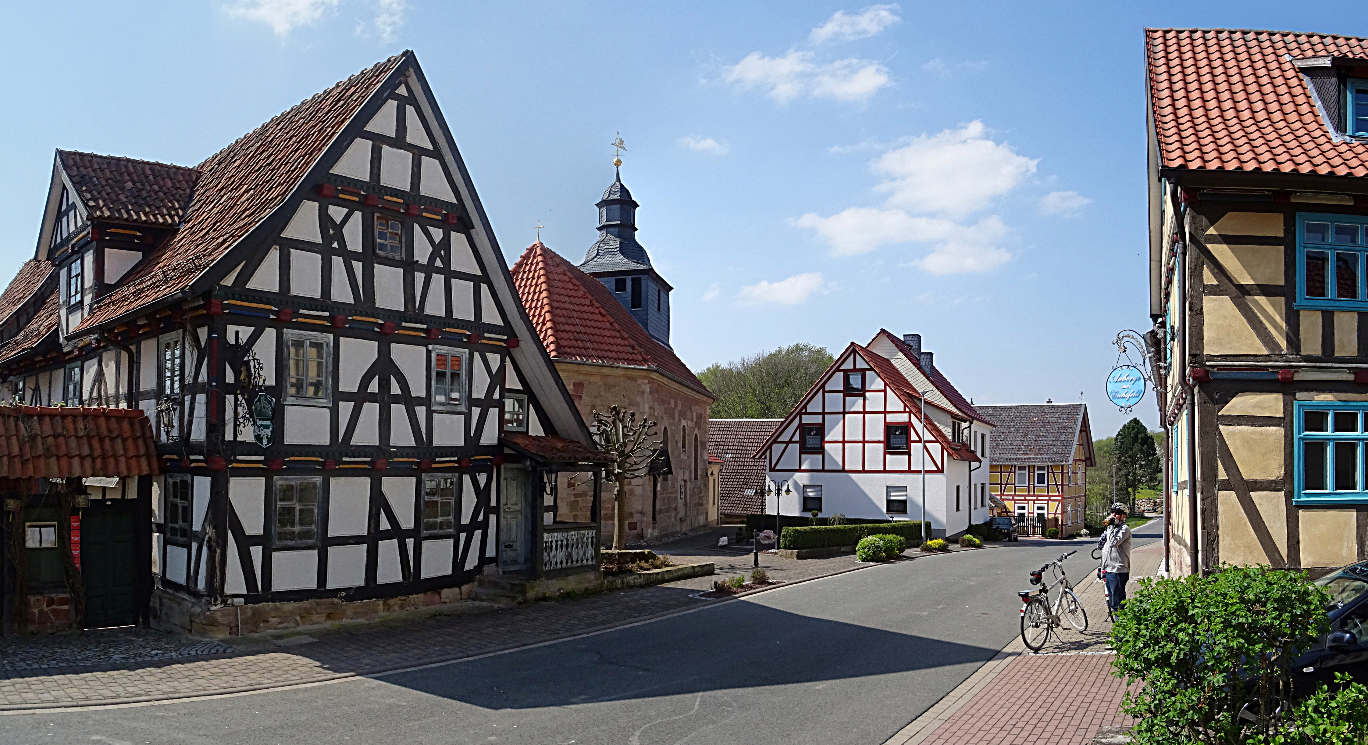 Dieterode im Eichsfeld